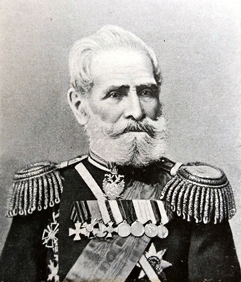 Генерал от инфантерии Александр Фёдорович Ган. Данное фото было использовано в статье «Ган, Александр Федорович» опубликованной в седьмом томе «Военной энциклопедии», который был издан книгоиздательским товариществом И. Д. Сытина в 1912 году в столице Российской империи городе Санкт-Петербурге.